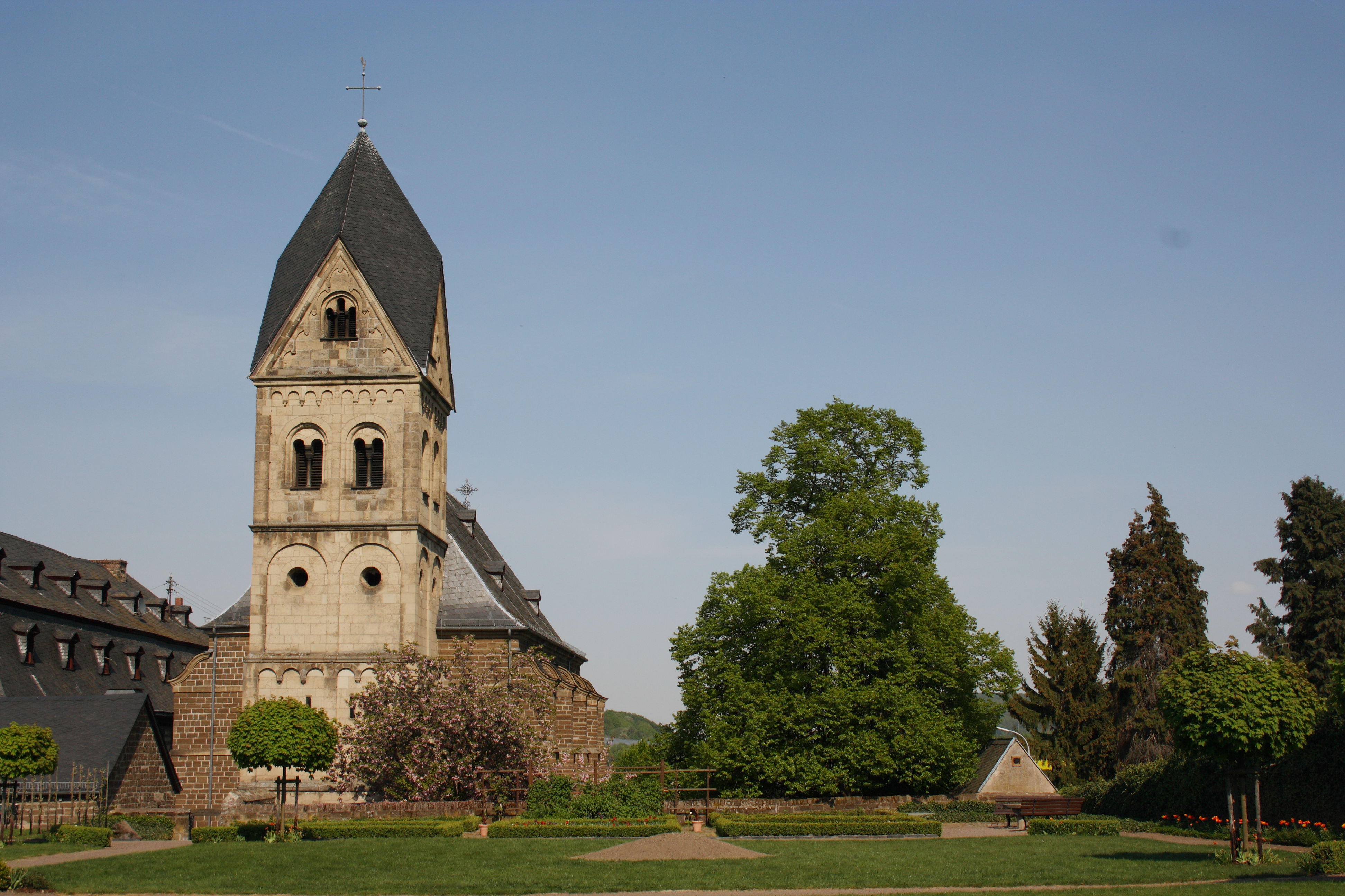 katholische Pfarrkirche St. Potentinus in Wehr